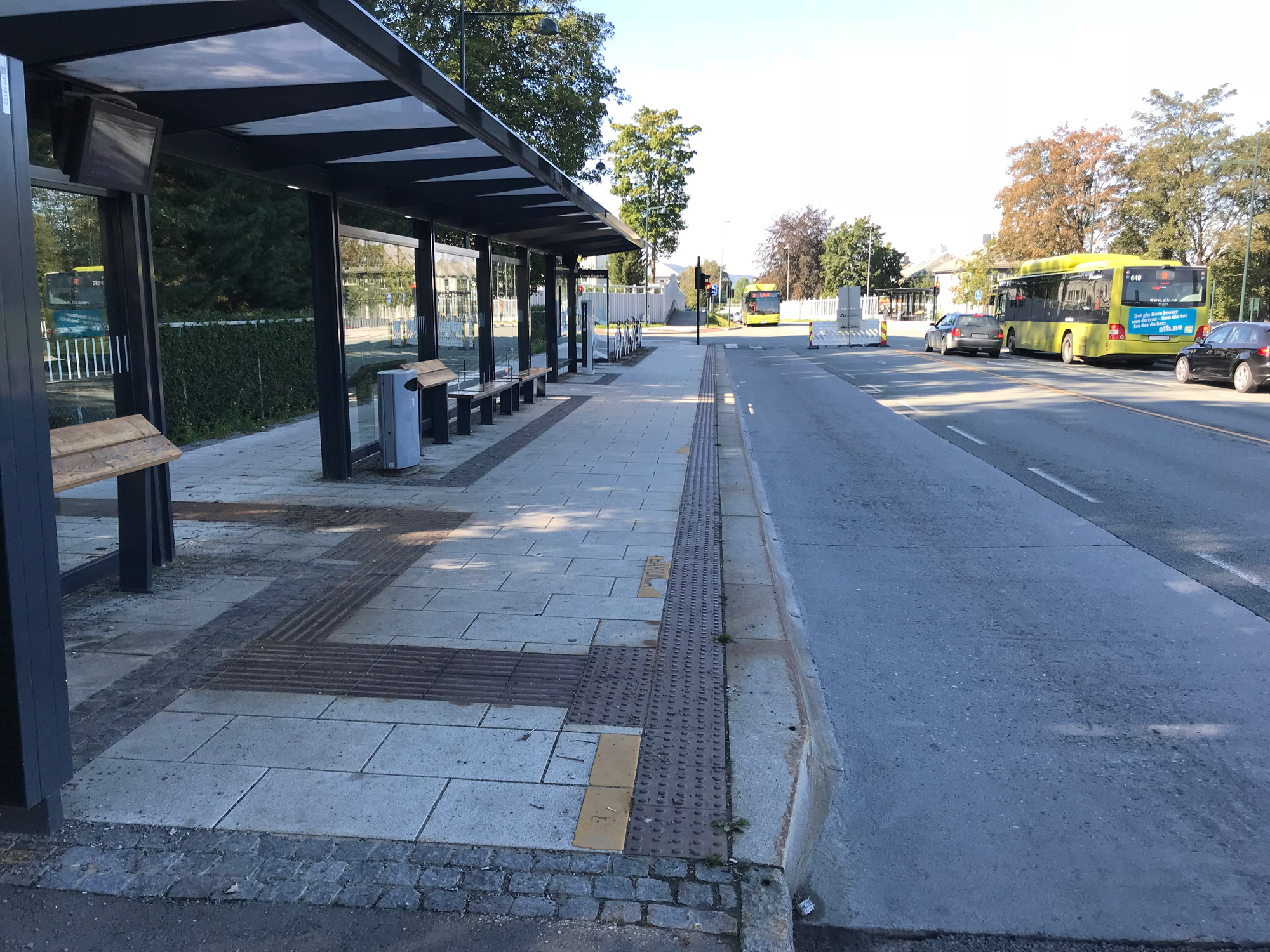 Holdeplass for Metrobuss i Trondheim på Dalen Hageby